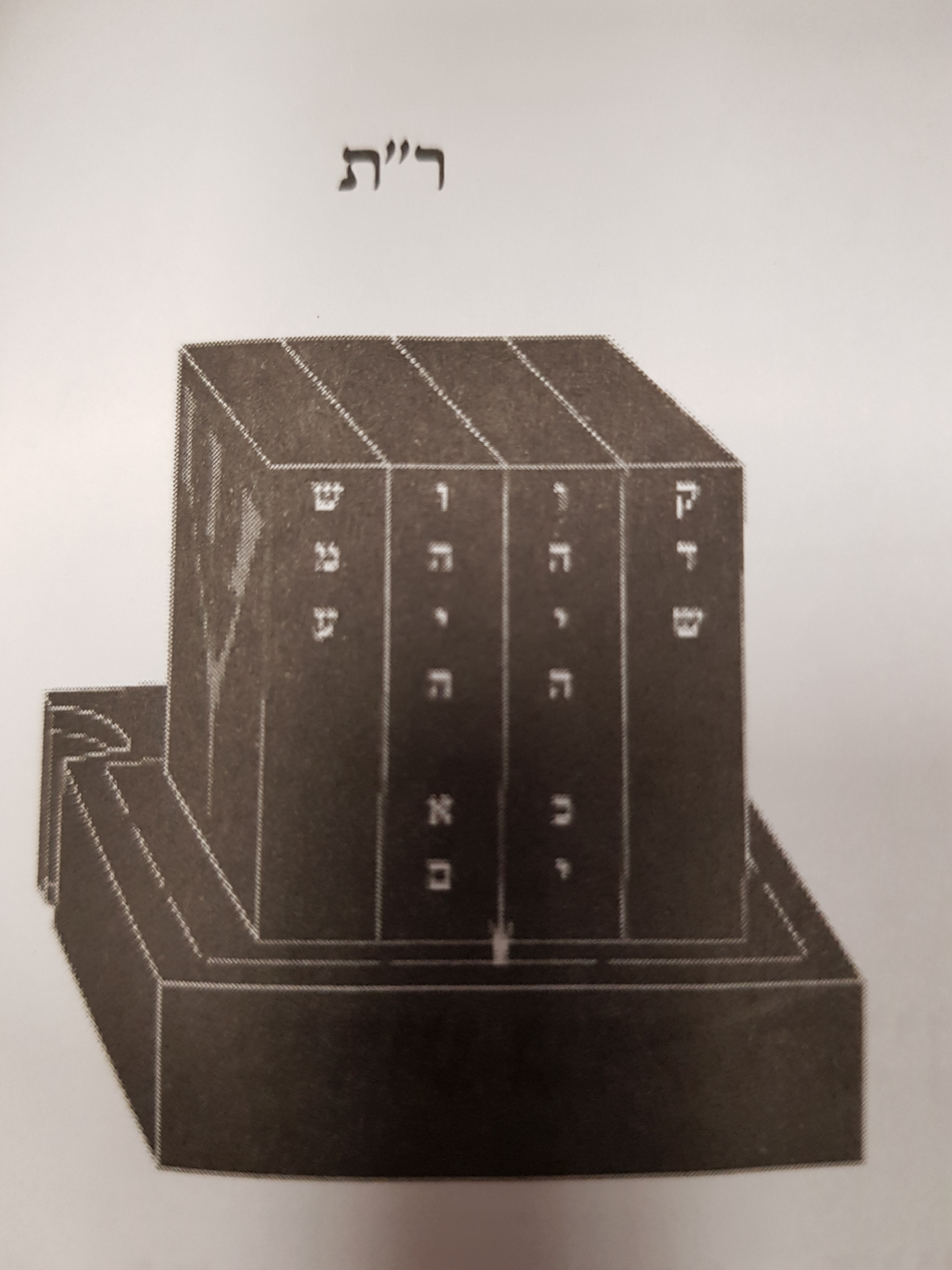 איור סדר פרשיות התפילין לפי ר"ת